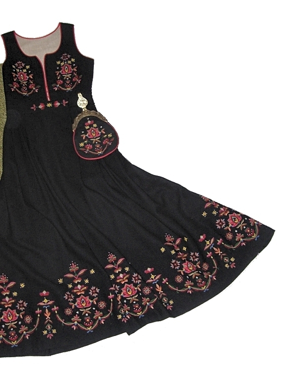 Kjolen m/lomme for Ørstabunaden